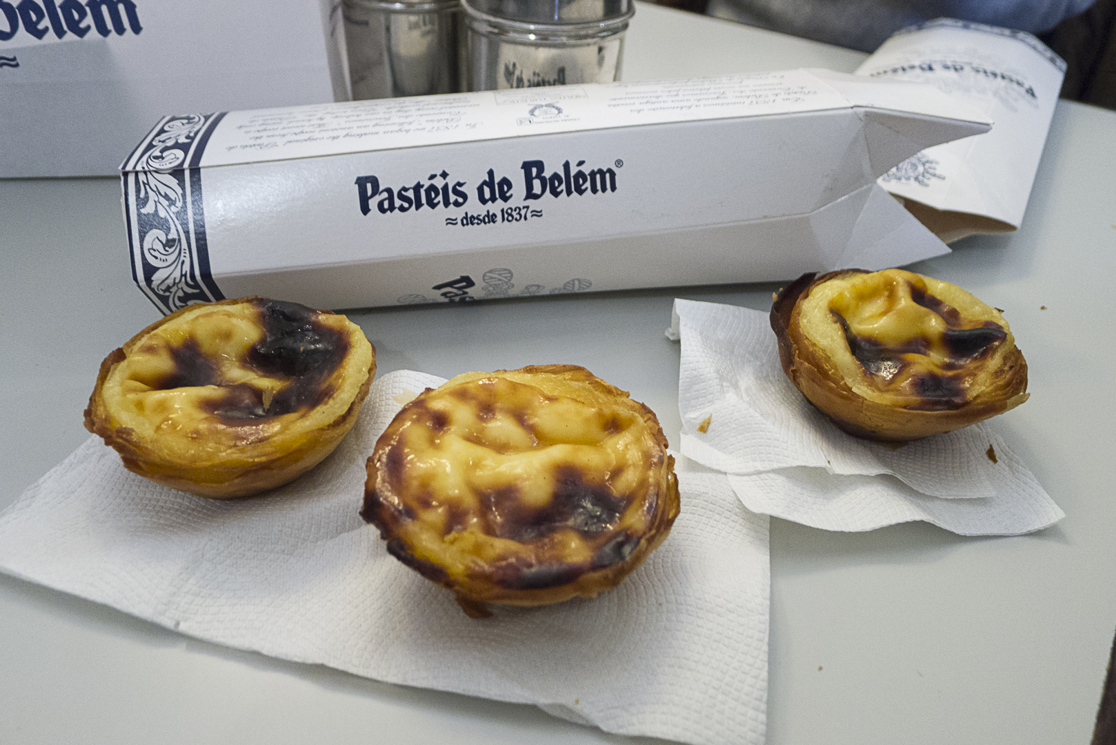 Portugal-Lisboa-Pastel de Belem-P1250305